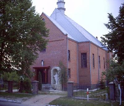 Saint John the Baptist Polish Catholic Church in Swieciechow Parafia św. Jana Chrzciciela w Świeciechowie Dużym